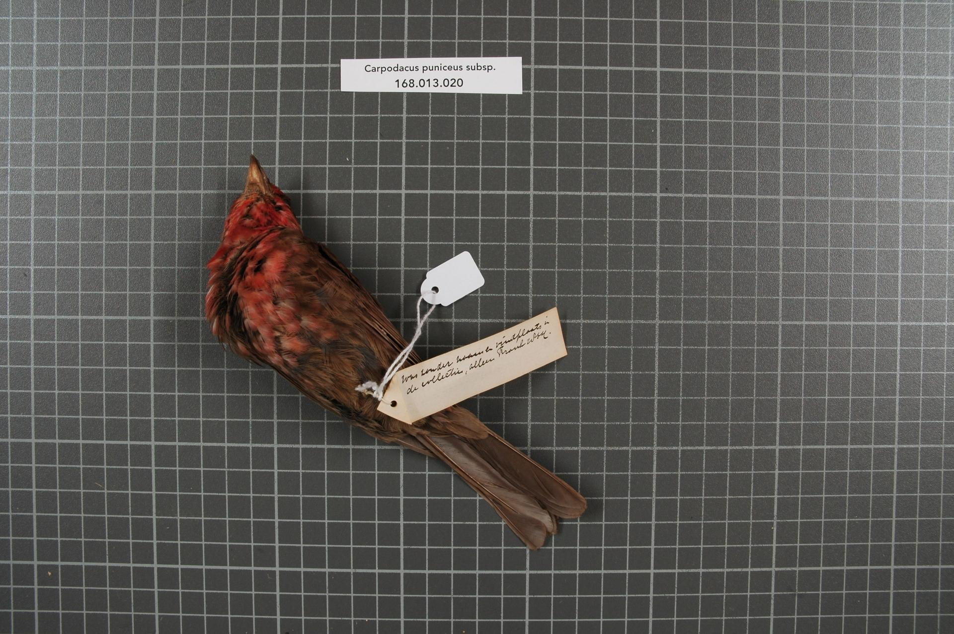 Carpodacus puniceus subsp.